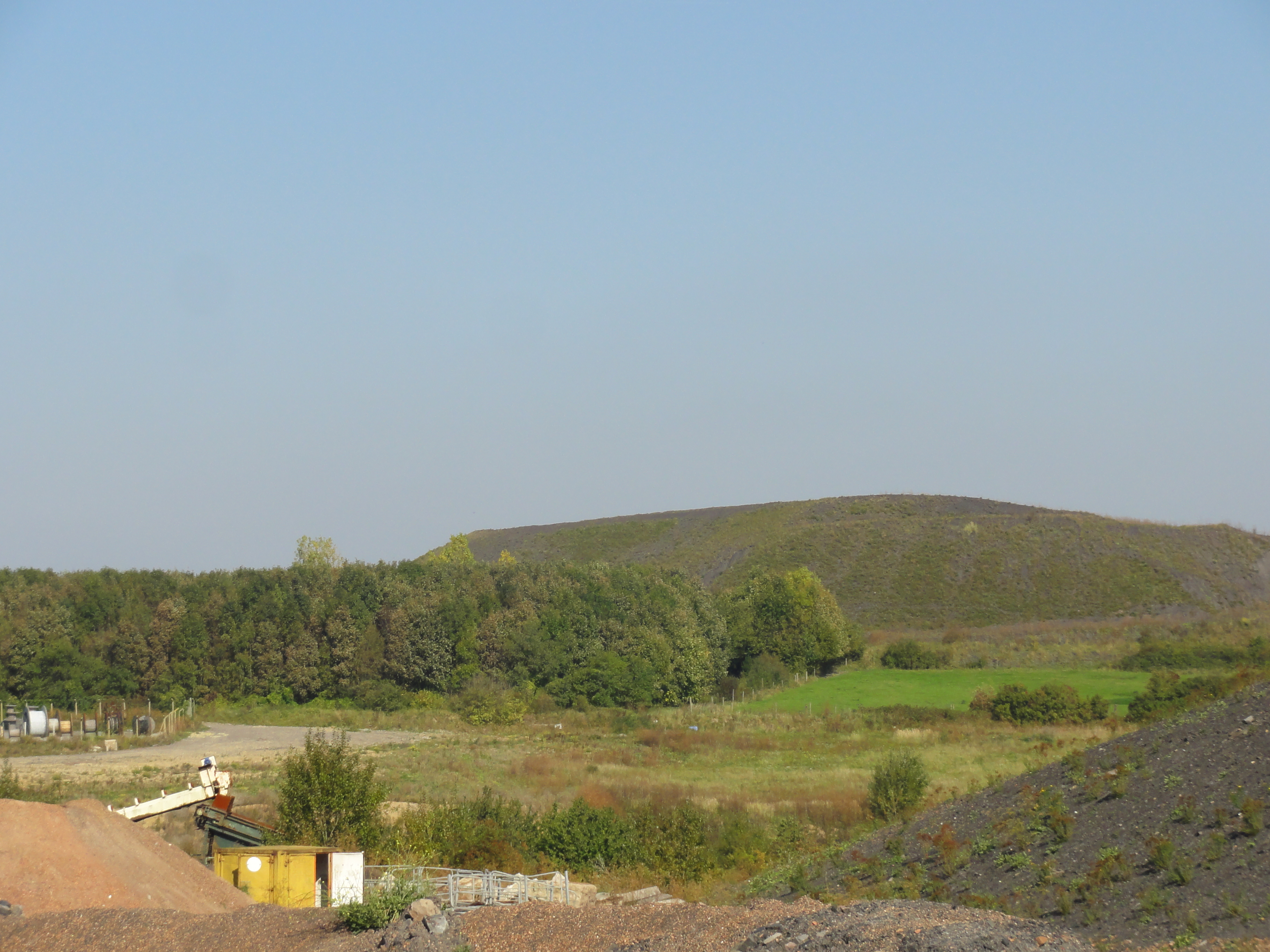 Terril n° 13 dit 3 d'Auchel Est, fosse n° 3 - 3 bis - 3 ter de la Compagnie des mines de Marles dans le bassin minier du Nord-Pas-de-Calais, Lozinghem, Pas-de-Calais, Nord-Pas-de-Calais, France.